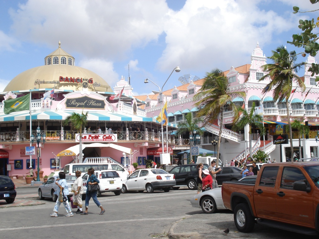 Oranjestad Aruba Shoping Palace